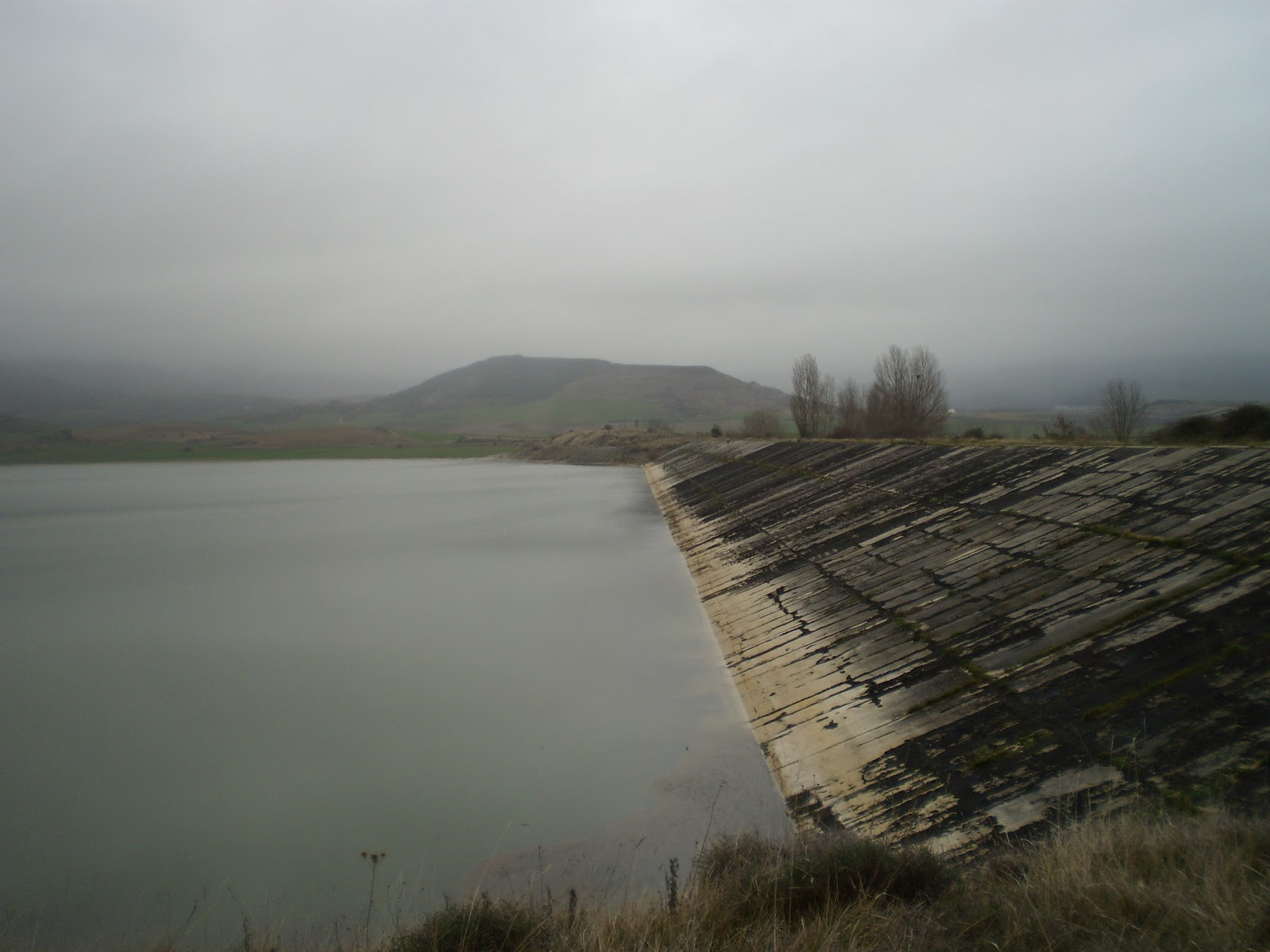 Dique del embalse de Zolina, en el municipio navarro de Aranguren.